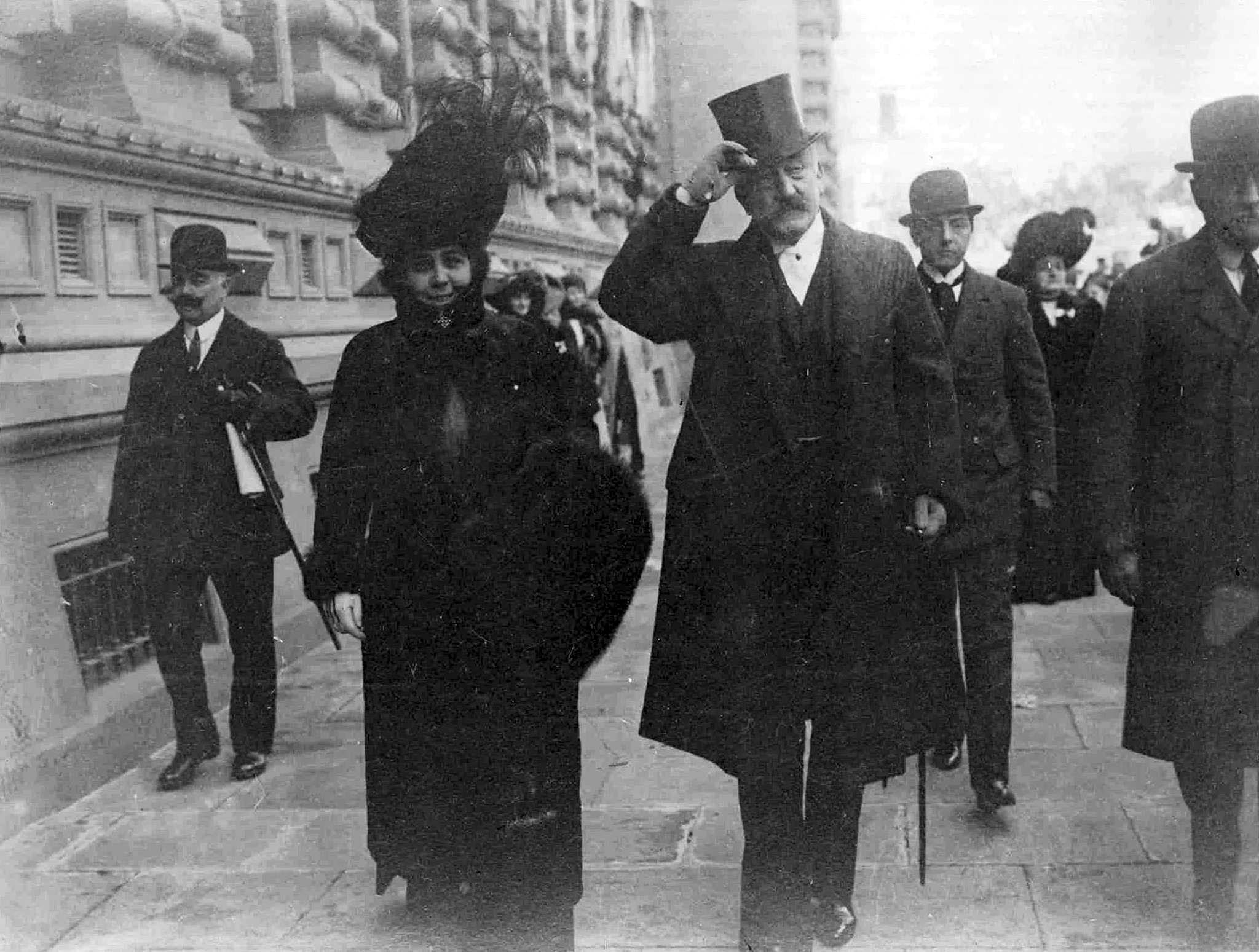 El Presidente Roque Saenz Peña con su esposa visitando el Concejo Nacional de Educación, 1911. Documento fotográfico. Inventario 35566. Archivo General de la Nación Argentina